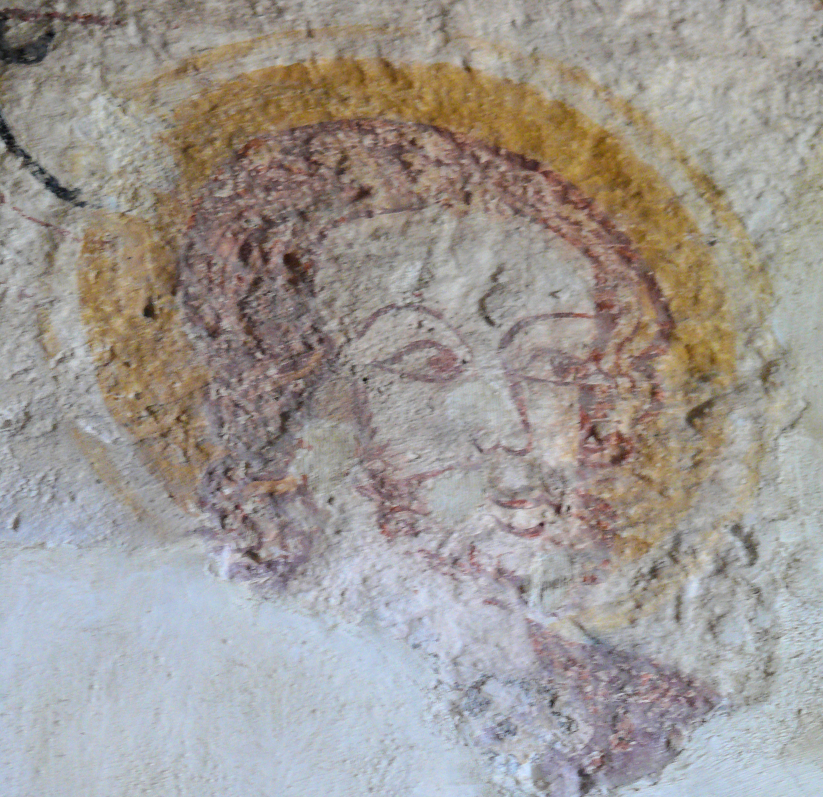 Les Forges - Eglise Saint-Nicolas - Peintures du XIIe siècle dans la sacristie - Détail